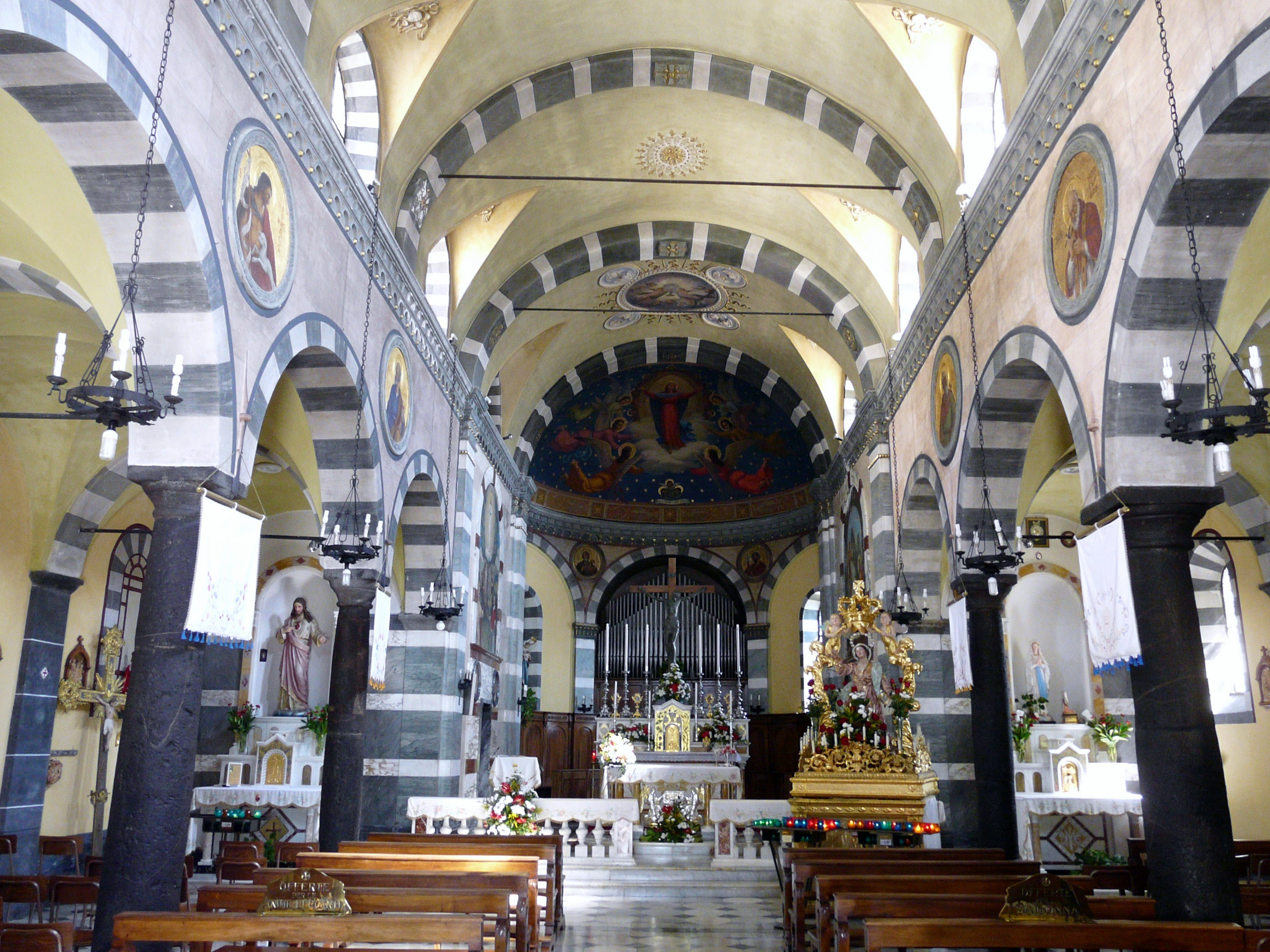 Serie di immagini della chiesa di Santa Maria Assunta, Allegrezze, Santo Stefano d'Aveto, Liguria, Italia